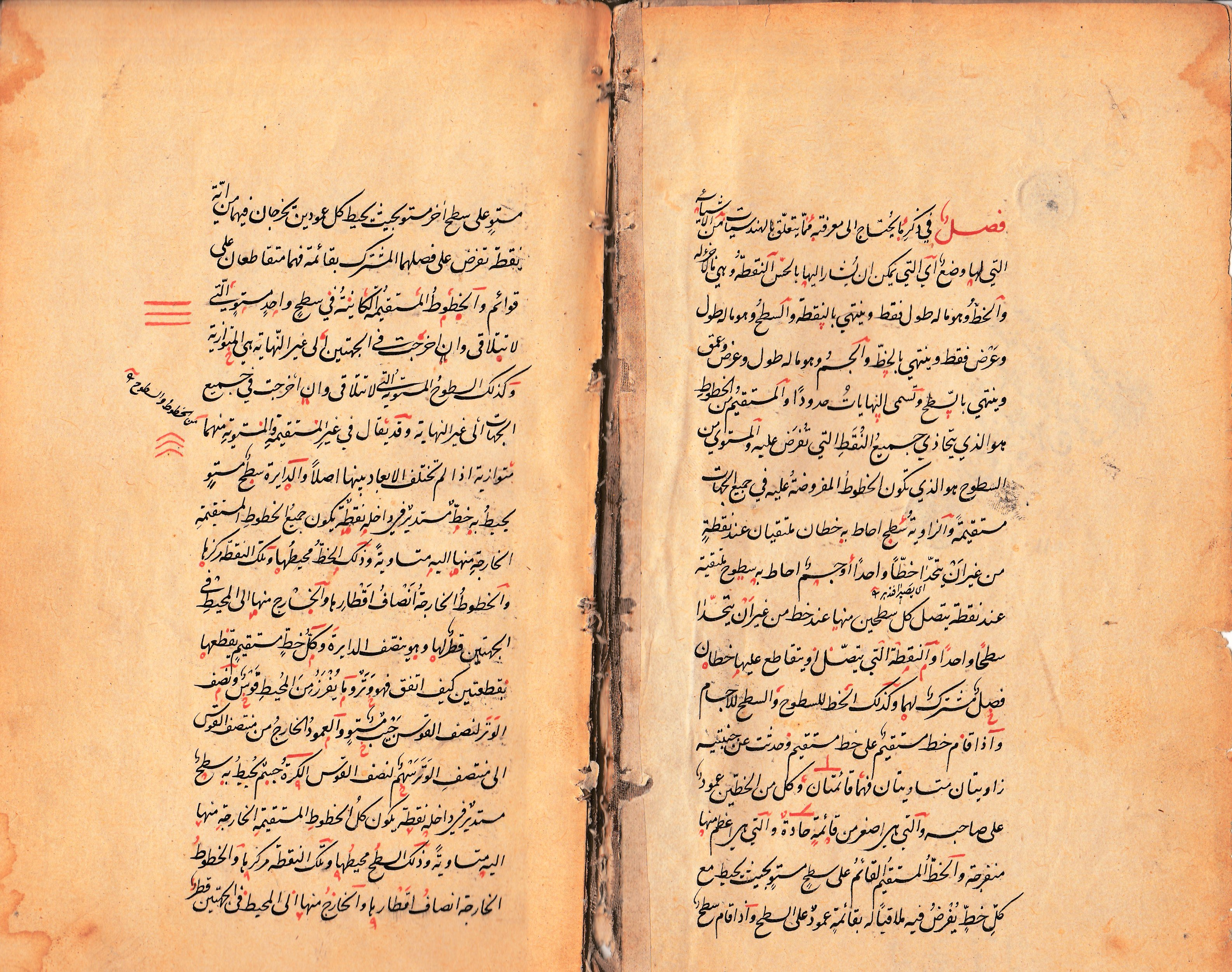 مقدمة كتاب (تشريح الأفلاك) في علم الهيئة، من تأليف بهاء الدين العاملي وعلى غلاف الكتاب ختم واهداء الشيخ نعمان خير الدين الآلوسي إلى استاذهِ وشيخه ملا قاسم أفندي المفتي عام 1273هجري/ 1856م، في بغداد